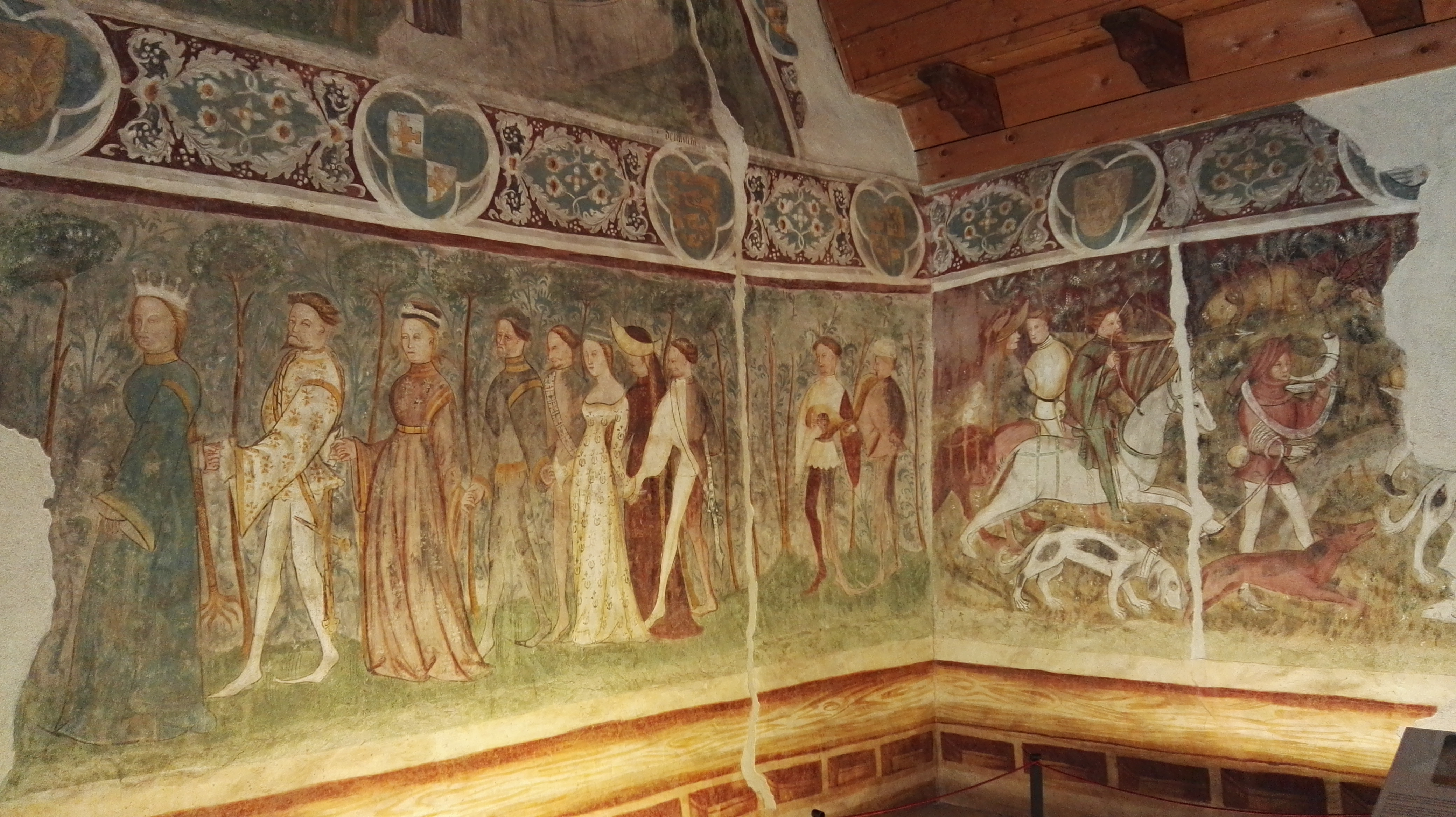 Schloss Runkelstein in Südtirol; Fresko